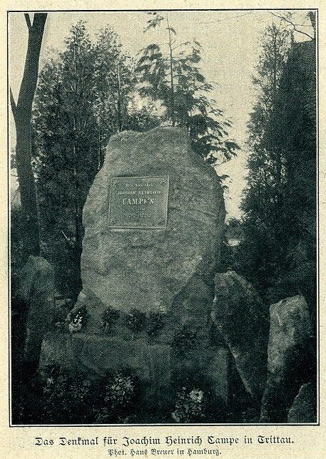 Das Denkmal für Joachim Heinrich Campe in Trittau, 1903